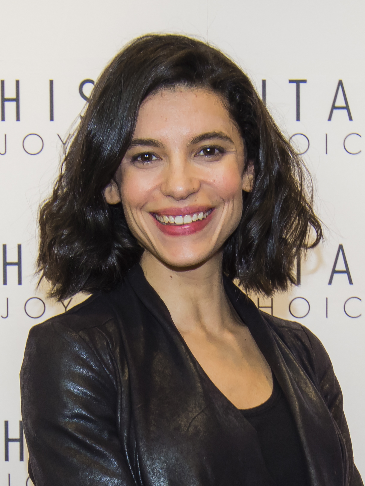 Irene Visedo en la inauguración de la tienda de Hispanitas en la calle Velázquez de Madrid (20 de octubre de 2016)